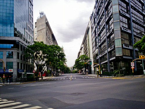 Diagonal Sur, Buenos Aires, vista desde la Avenida Belgrano.